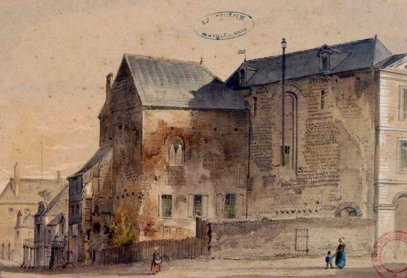 Représentation picturale du Palais des Comtes du Maine au Mans, par l'artiste peintre Louis Moullin en 1854. Dessin et peinture.